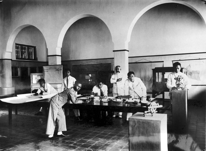 Ruang praktek pensurveian dan perataan tanah bagian Bangunan Jalan Kereta Api dan Bangunan Air di Sekolah Teknik - Technische School "Prinses Juliana School". Pada masa kemerdekaan menjadi Sekolah Teknik Menengah (ijazah pertama dikeluarkan tahun 1951) yang merupakan Sekolah Teknik Negeri yang pertama di Indonesia. Tahun 1952 dipecah menjadi dua sekolah, yaitu STM Negeri I (Bagian Bangunan dan Kimia), STM Negeri II (Bagian Listrik dan Mesin). Pada dekade 1970-an digunakan bersama oleh STM Negeri I (Bagian Bangunan dan Kimia), STM Negeri II (Bagian Listrik dan Mesin), STM Chusus Instruktur (Bagian Bangunan, Listrik, Diesel dan Mesin), STM Geologi Pertambangan, STM Metalurgi, STM Pertanian, STM Percobaan I dan STM Percobaan II. Pada tahun 1975 semua STM di kompleks Jetis digabungkan menjadi STM Yogyakarta I. Tanggal 11 April 1980 menjadi STM I Yogyakarta. Sejak 7 Maret 1997 menjadi SMK Negeri 2 Yogyakarta.